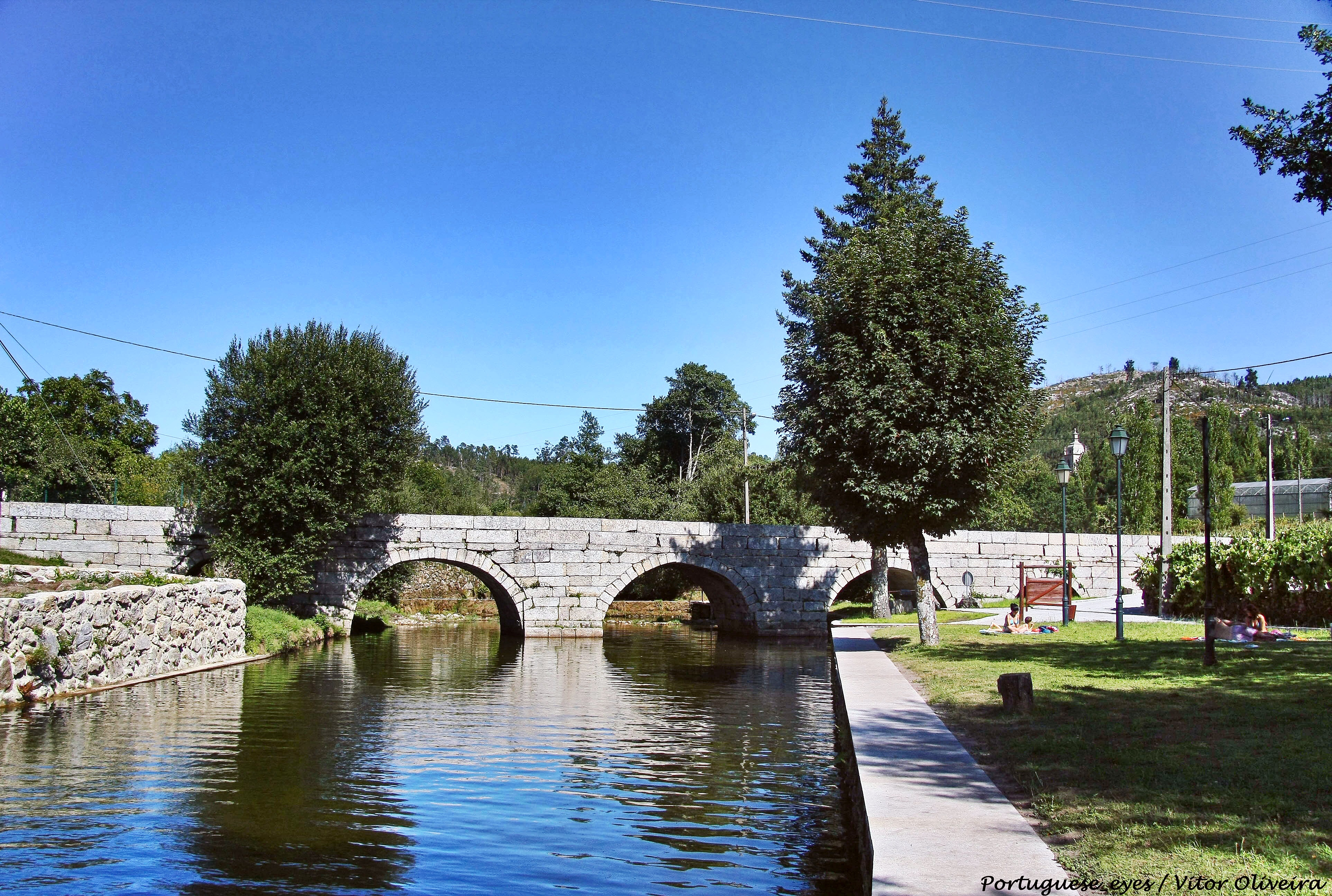 Praia Fluvial de São João do Monte - Portugal 🇵🇹